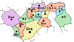 carte du canton de Grandvillars (Territoire de Belfort)